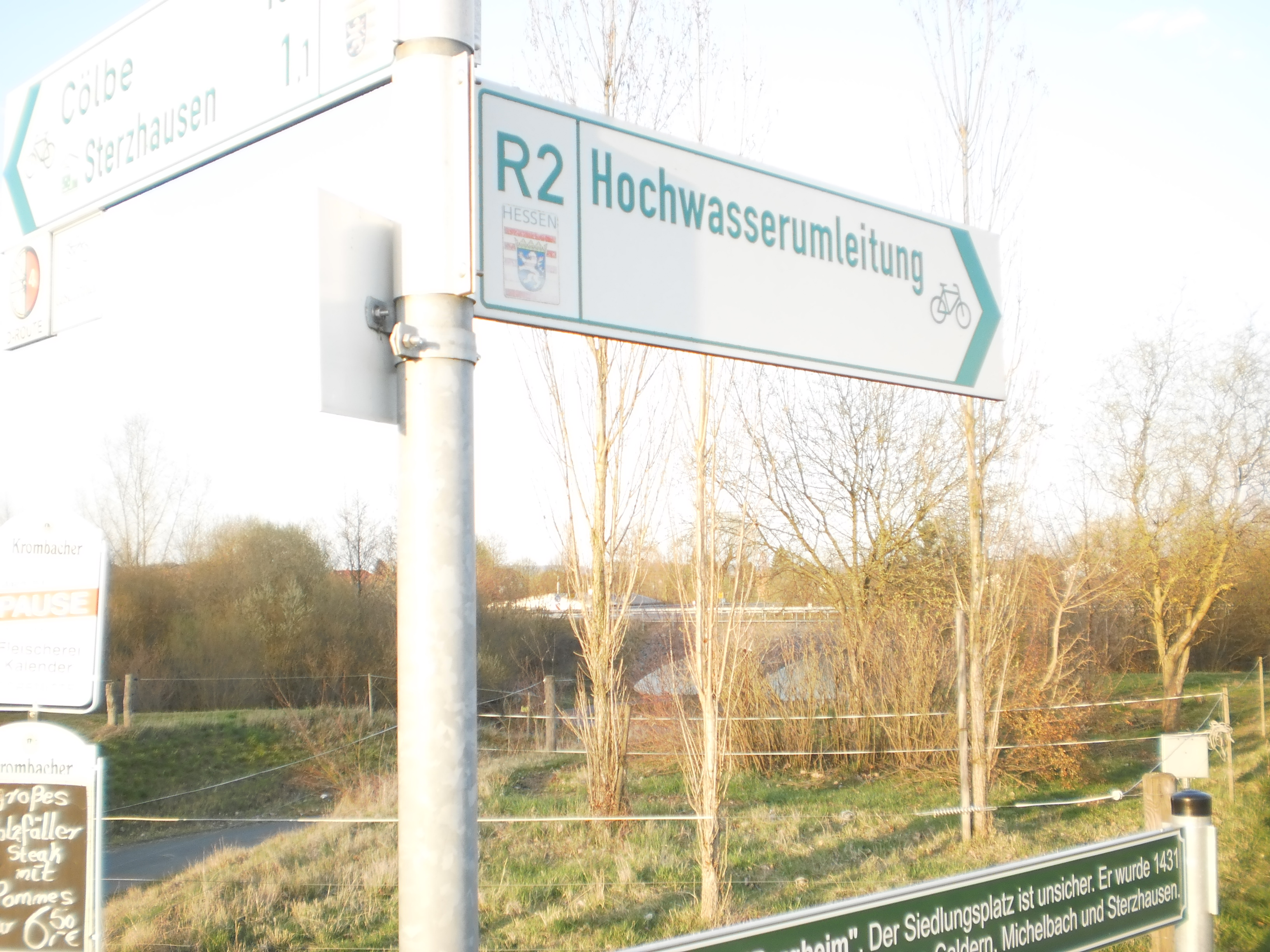 Hochwasserumleitung am Lahntalradweg mit Radverkehrswegweisung, Unterquerung der Kreisstrasse 79 bei Sterzhausen im Landkreis Marburg-Biedenkopf mit dem Durchlassbauwerk der Hochwassermulde im Hintergrund des Fotos, 2017-03-27.